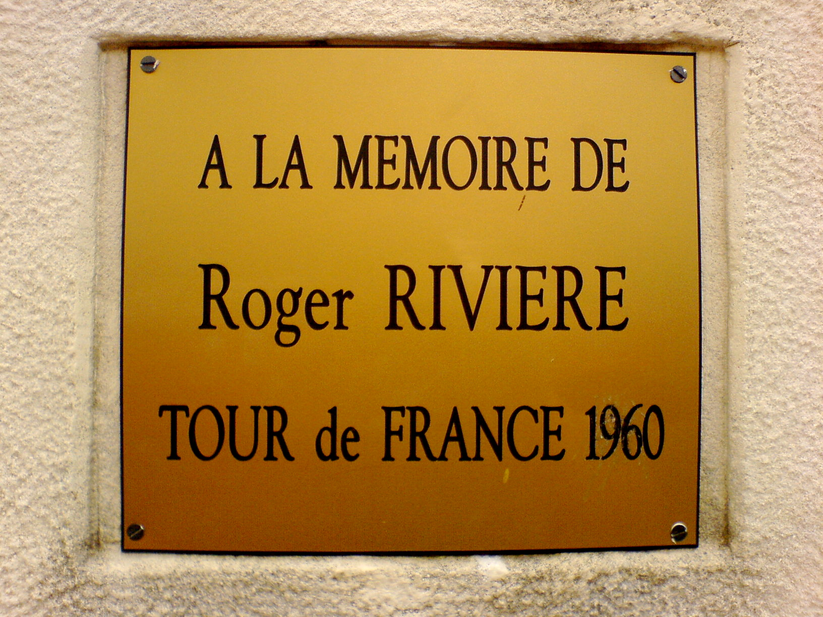 Bordje onder gedachtenismonument voor de val van Roger Rivière. Op de plaats van het ongeval, de afdaling van de Perjuret.